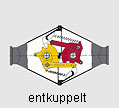 Entkuppelte Schaku